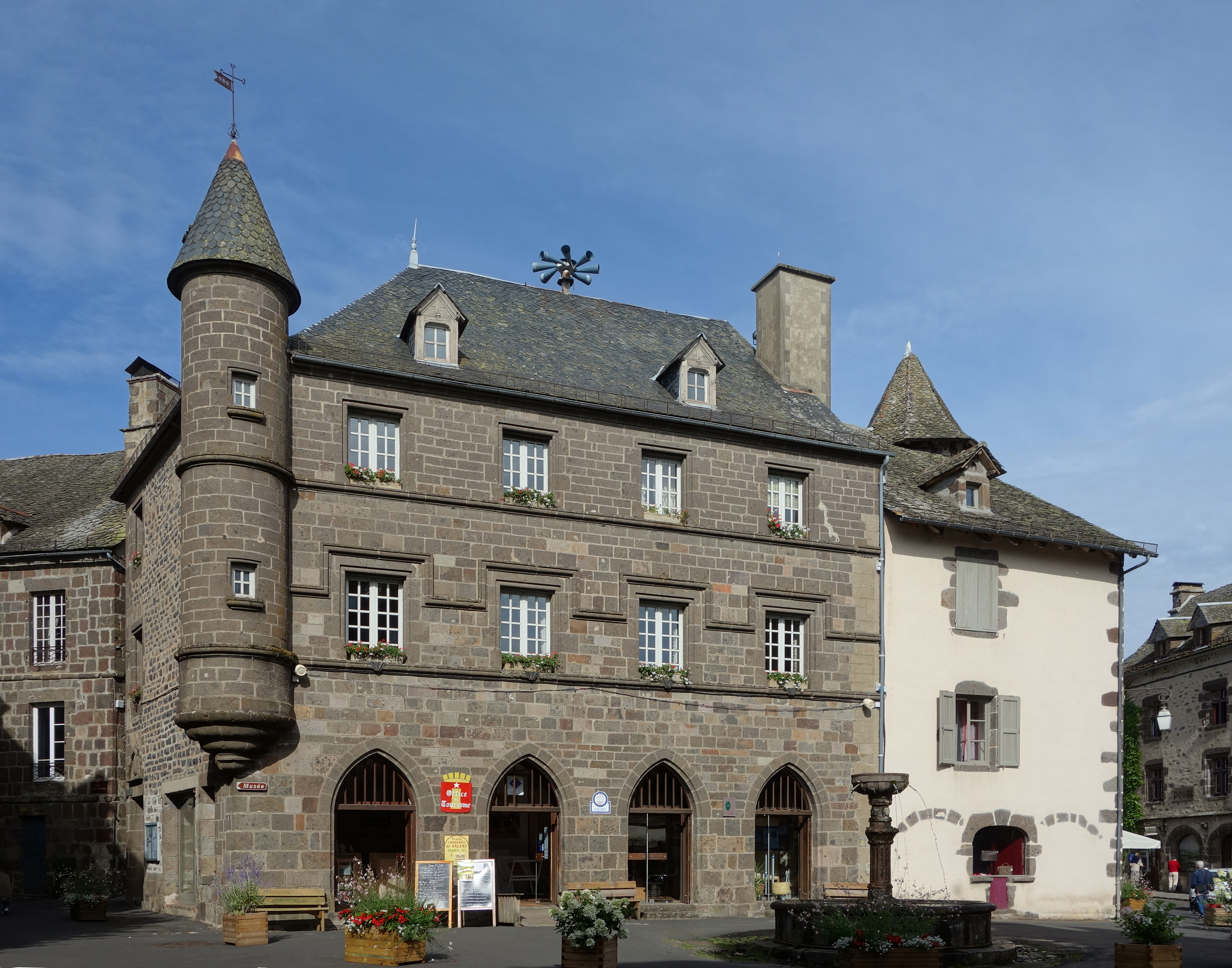 L'office de tourisme de Salers.